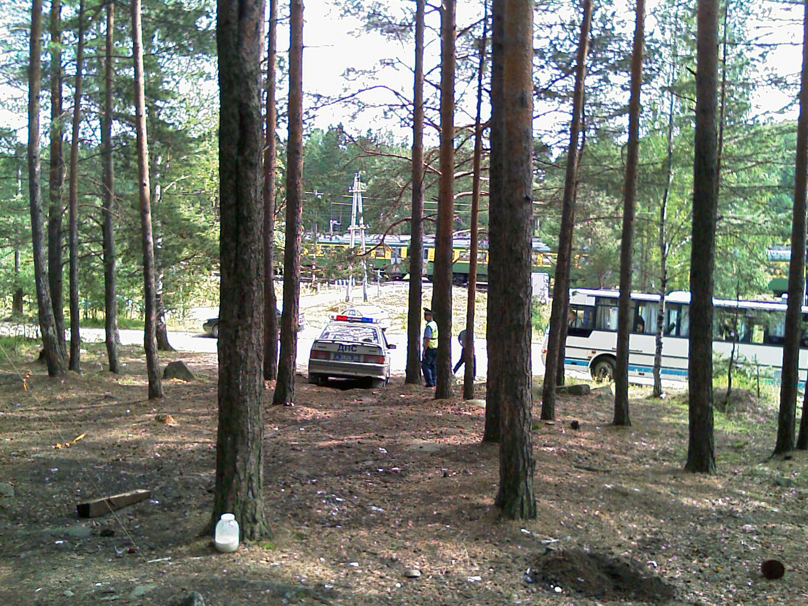 Полицейский пост на въезде в Сагра (посёлок)